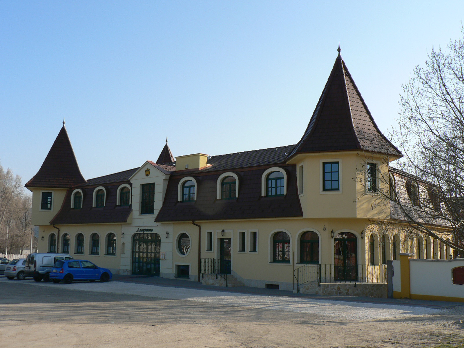 Aranykorona Vendéglő